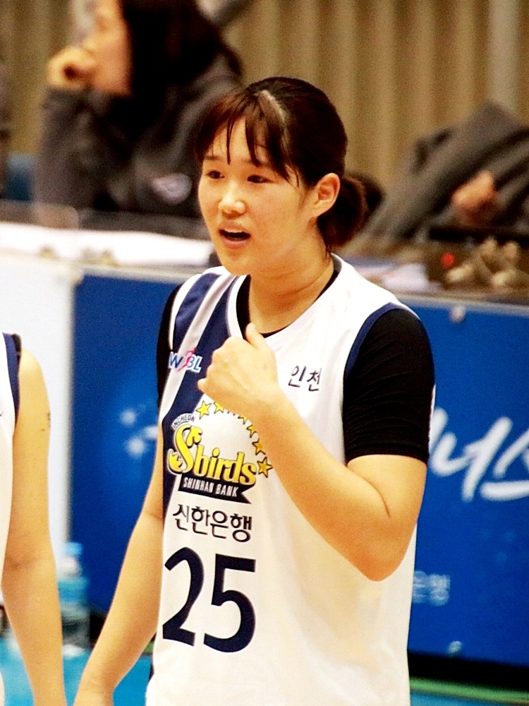 160205 여자농구 KDB생명 vs 신한은행 퓨처스